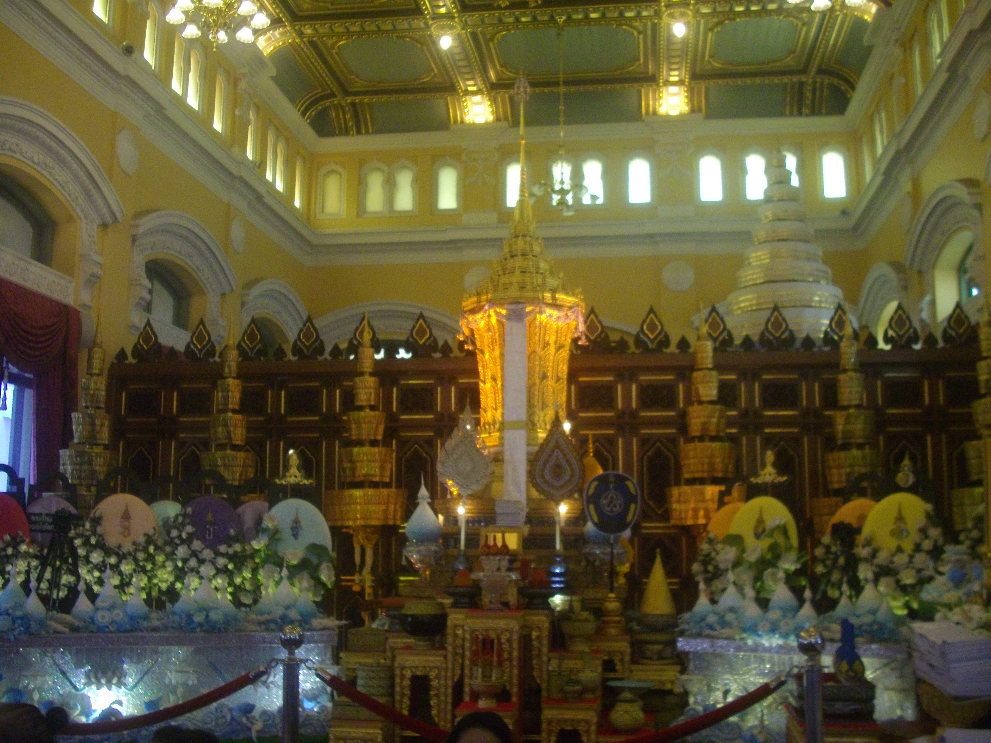 พระโกศกุดั่นใหญ่ประกอบพระเกียรติยศสมเด็จพระยานสังวร สมเด็จพระสังฆราช สกลมหาสังฆปริณายก ประดิษฐานภายใต้พระเศวตฉัตรสามชั้น ณ ตำหนักเพ็ชร วัดบวรนิเวศวิหาร บันทึกภาพเมื่อวันที่ 10 ธันวาคม พ.ศ. 2558